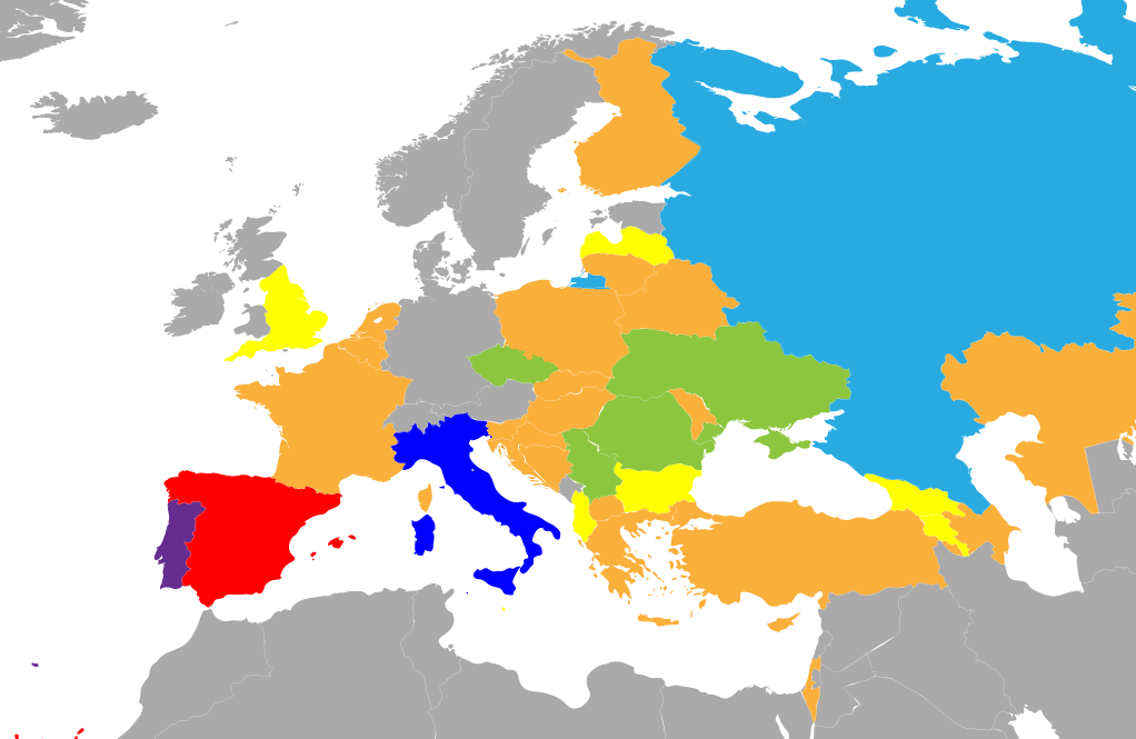 Rosso: Campione d'Europa Blu: Vice-campione d'Europa Azzurro: Terzo classificato Viola: Quarto classificato Verde: Fase finale a gironi Arancio: Qualificazioni Giallo: Fase Preliminare